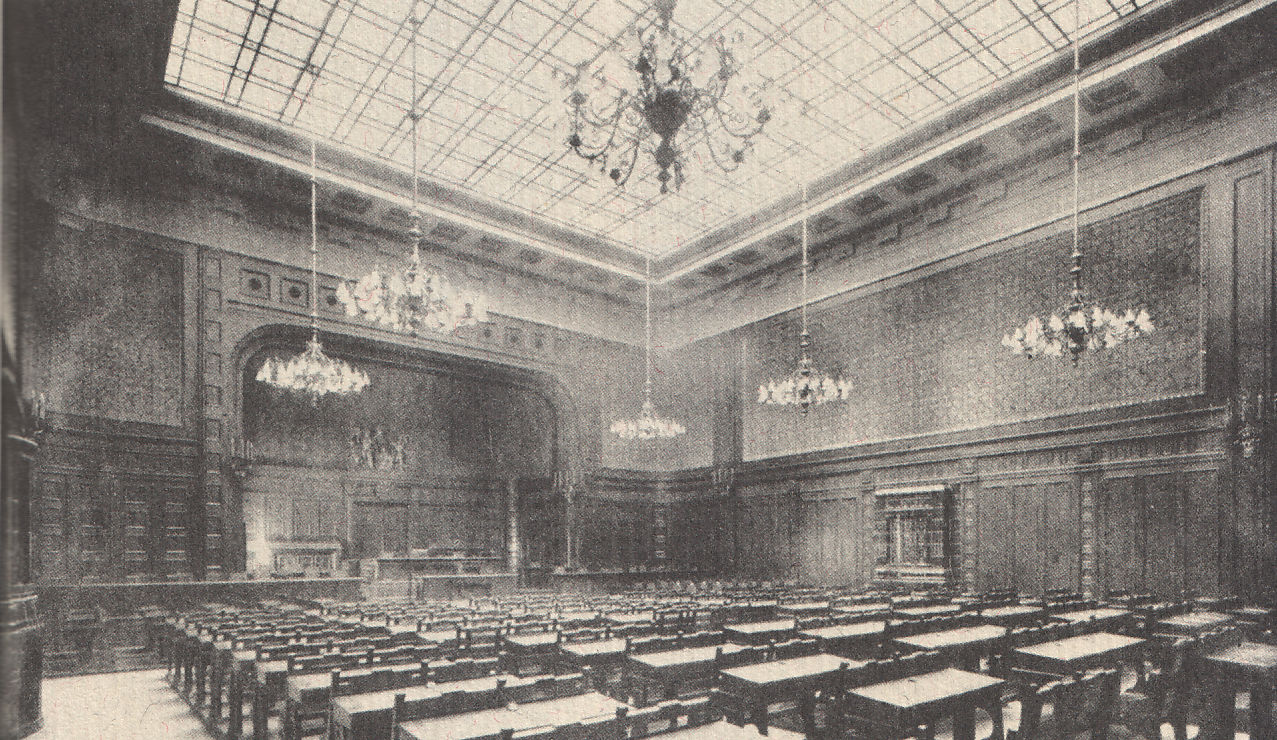 Sitzungssaal des Ständehauses in Düsseldorf (um 1900?). Mit diesem Schreiben vom 20. April 1890 bestimmte Berlin die Stadt Düsseldorf zum Sitz der Rheinprovinz (Auszug).